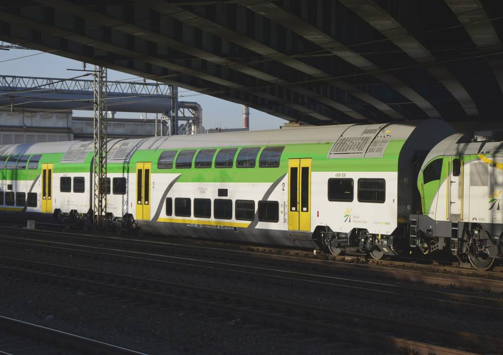 Wagon piętrowy 416B-006 w pociągu push-pull stoi na bocznicy zakładu Pesa Bydgoszcz.